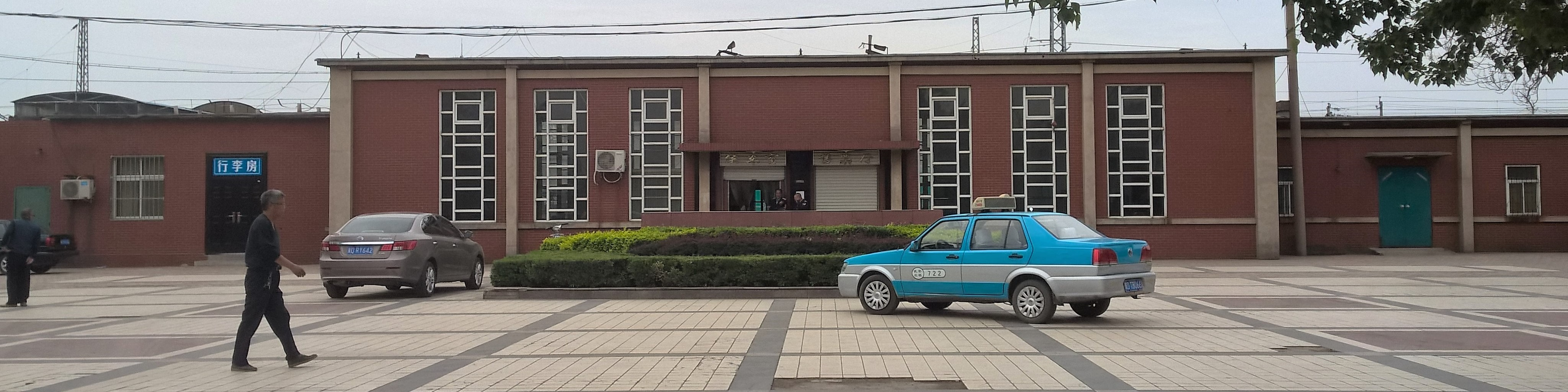 武安市武安火车站